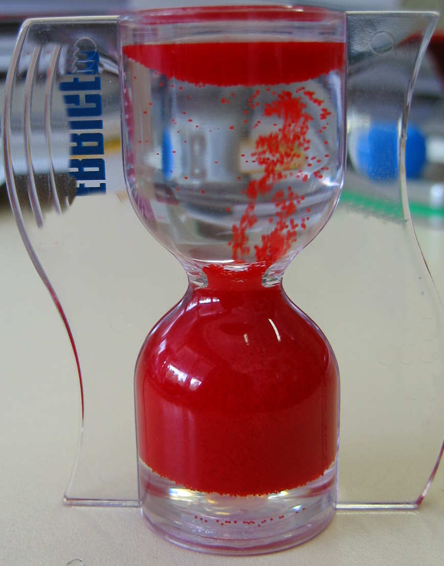 Paradoxe-Sanduhr Public Domain / eigenes Bild